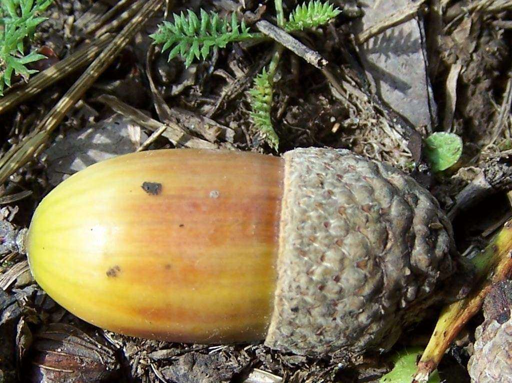 Quercus robur, (pl. dąb szypułkowy)